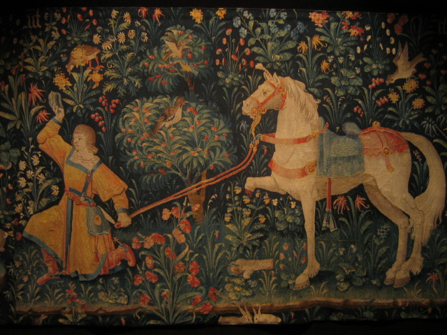 Tapisserie à fleurs et à monogramme représentant saint Éloi (Tapisserie de Guigone de Salins), tissée en France, XVe siècle, hospices de Beaune, Bourgogne, France.